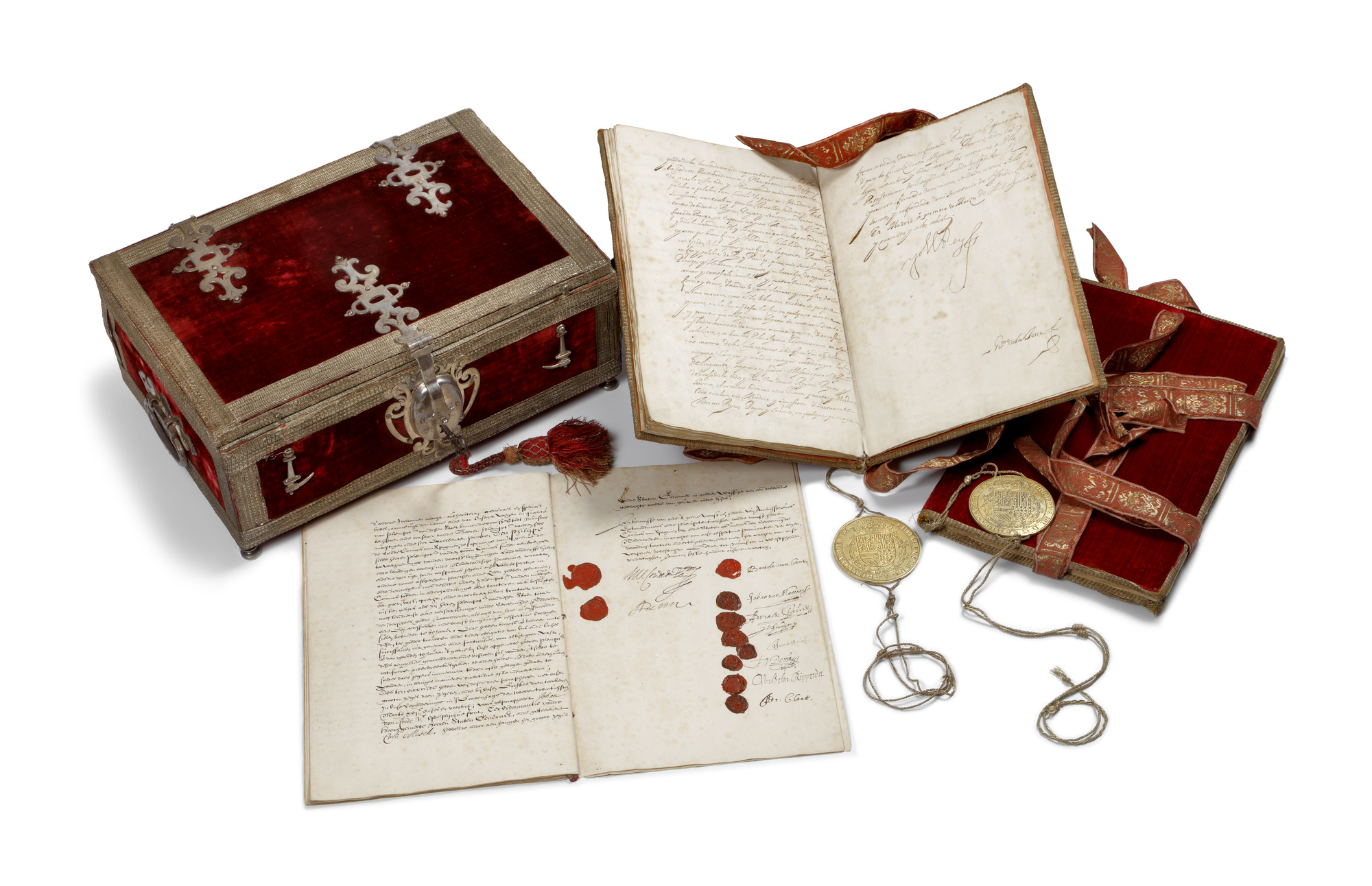 Kistje van de Vrede van Münster Staten-Generaal, inventarisnummer 12588.55A